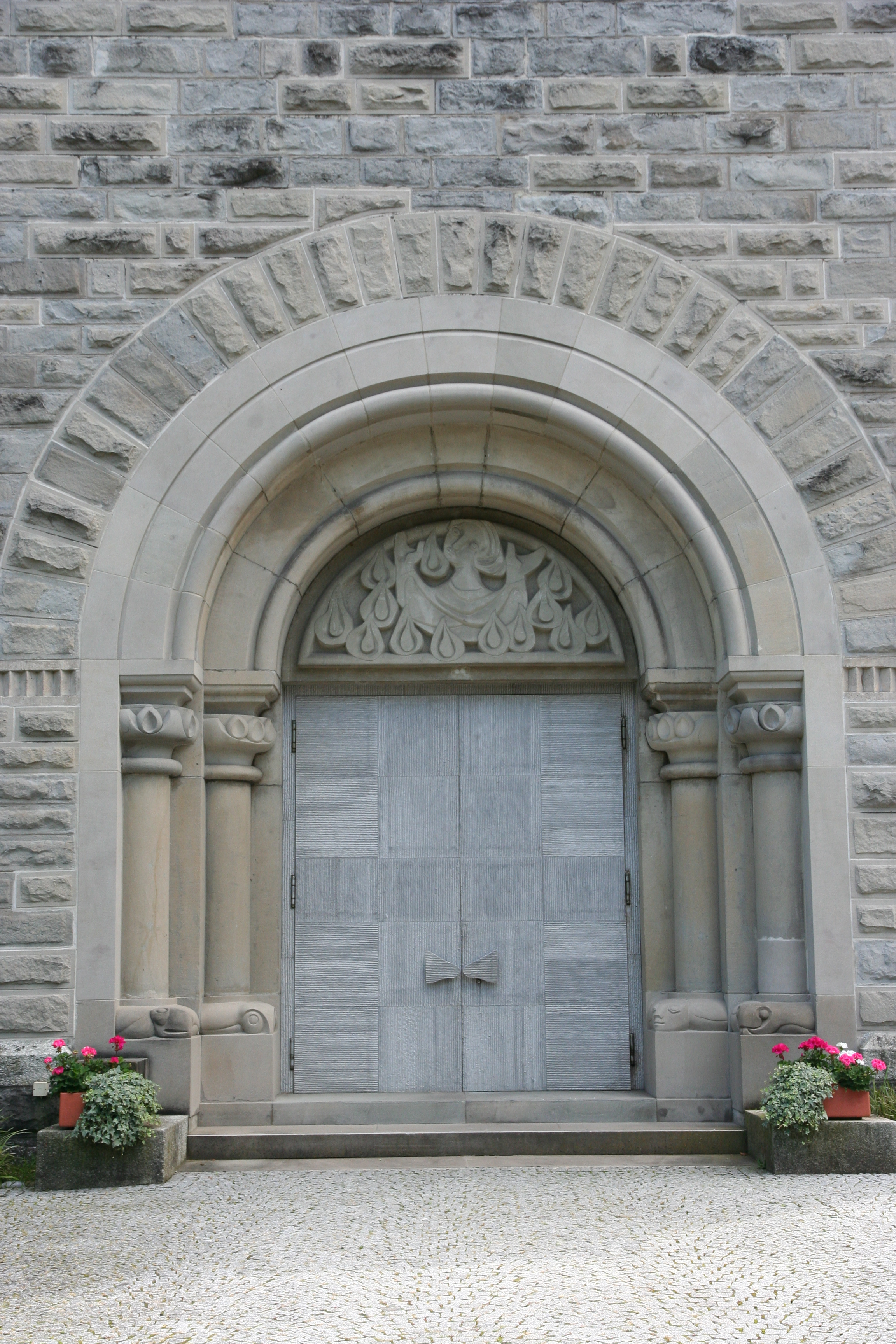 Römisch-katholische Pfarrkirche St. Marien Wädenswil, Portal